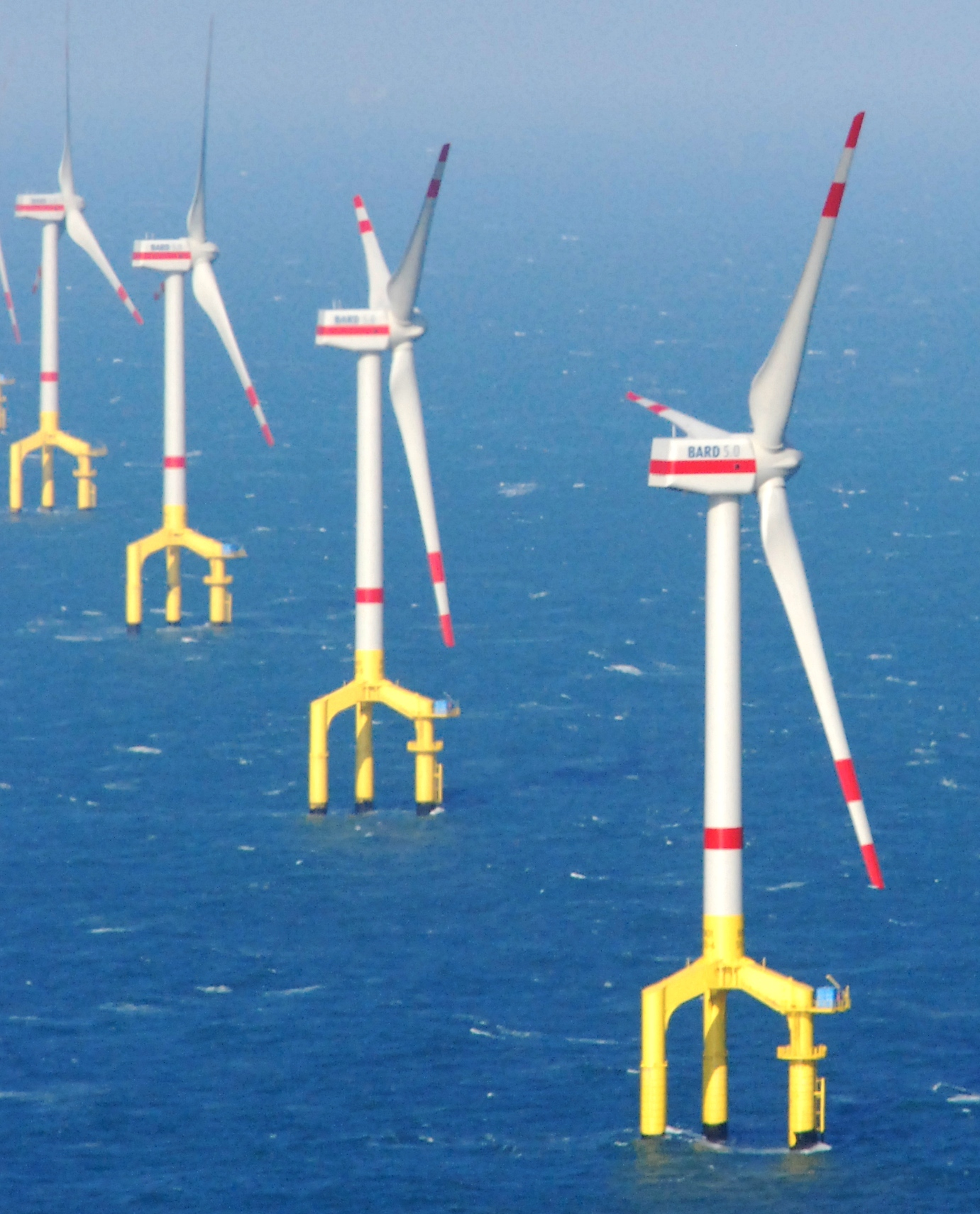 Parc éoliens offshore BARD Offshore 1 au nord de l' île de Borkum en 2011